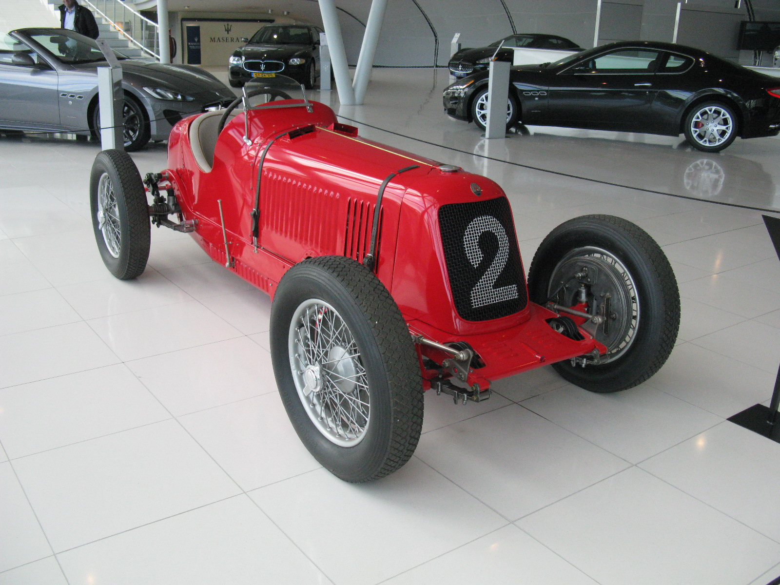 Maserati 4CM 1933